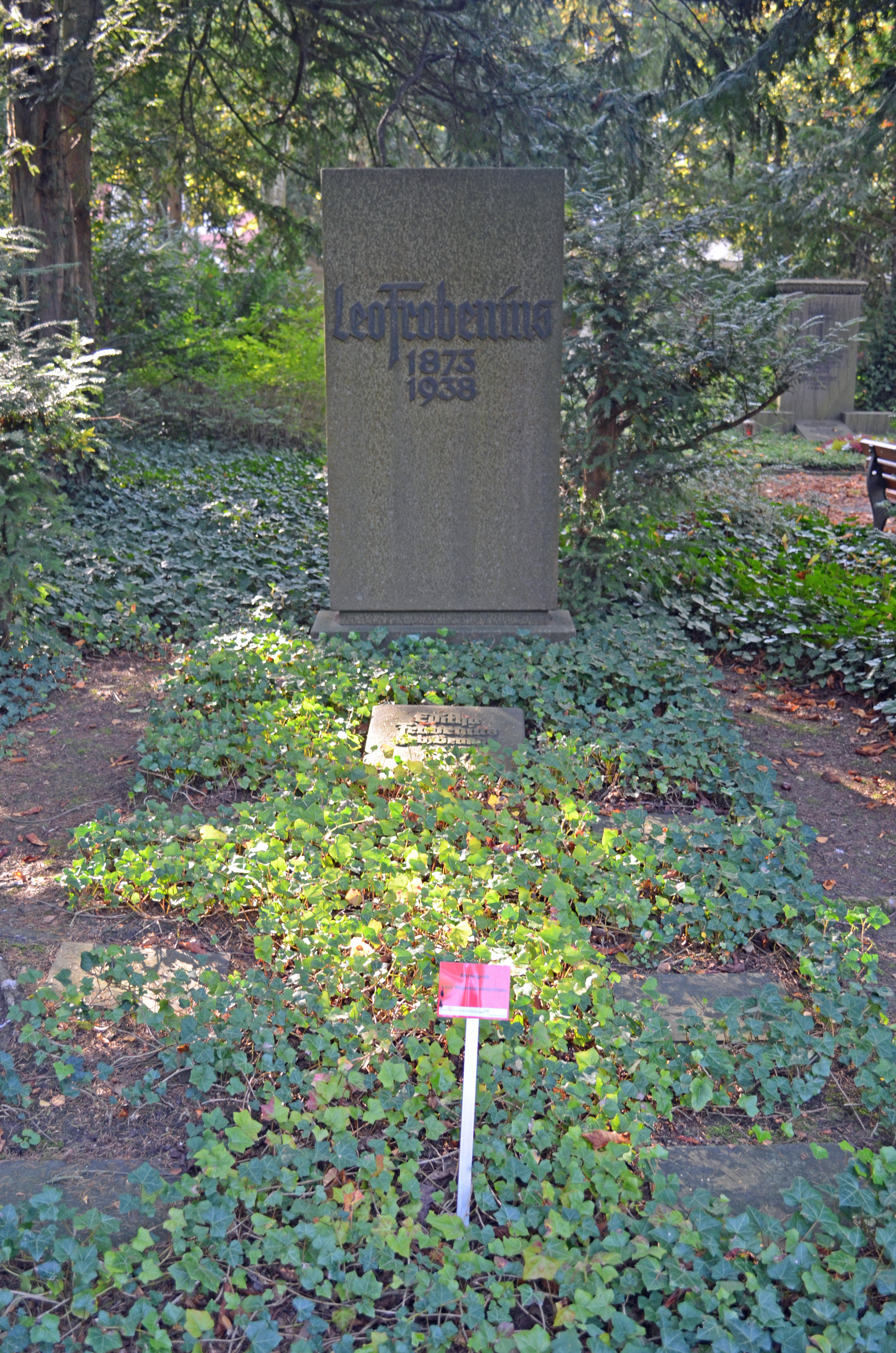 Frankfurt, Hauptfriedhof, Ehrengrab Leo Frobenius, Gewann C